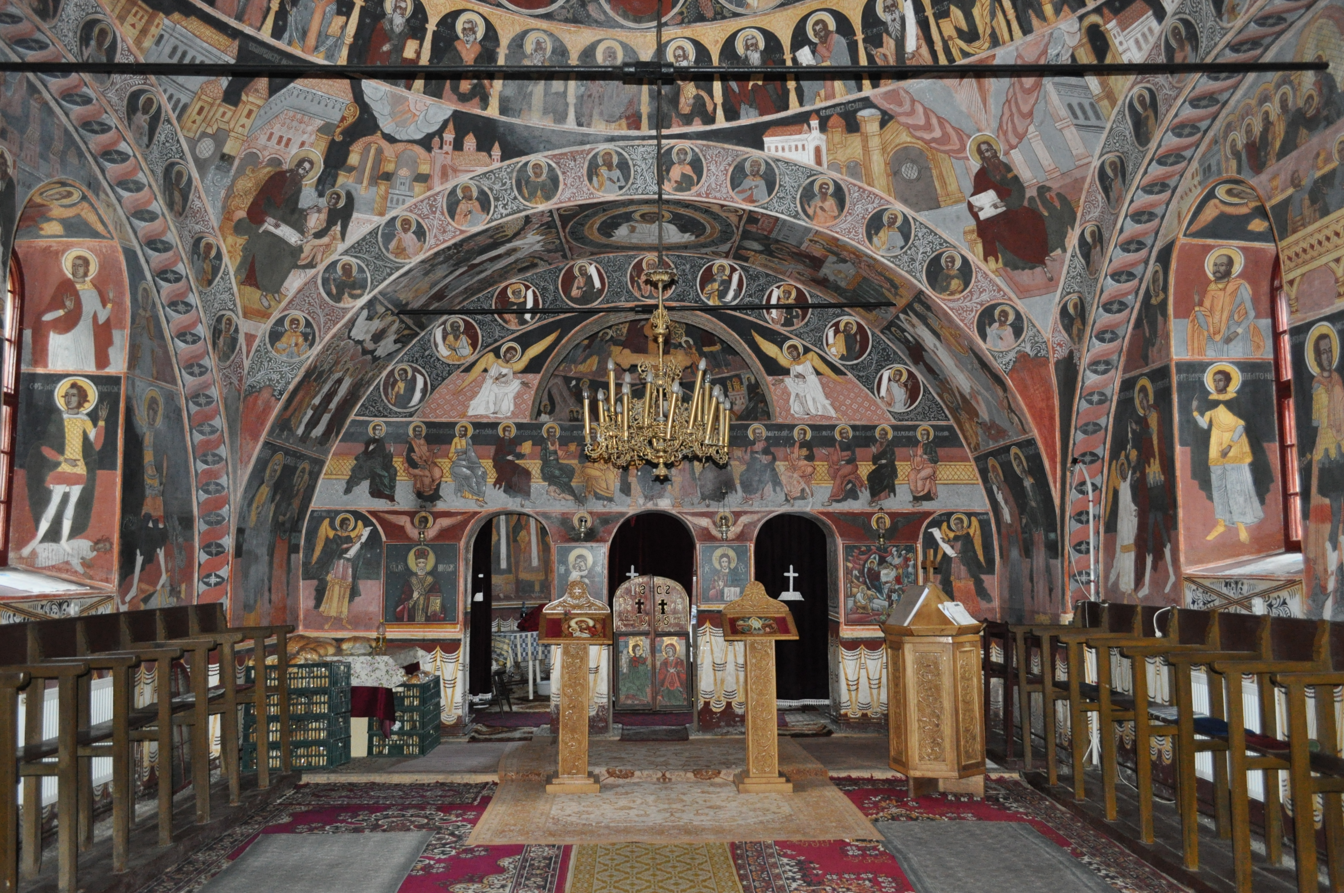 Biserica "Naşterea Domnului" , sat SĂRATA; comuna PORUMBACU DE JOS